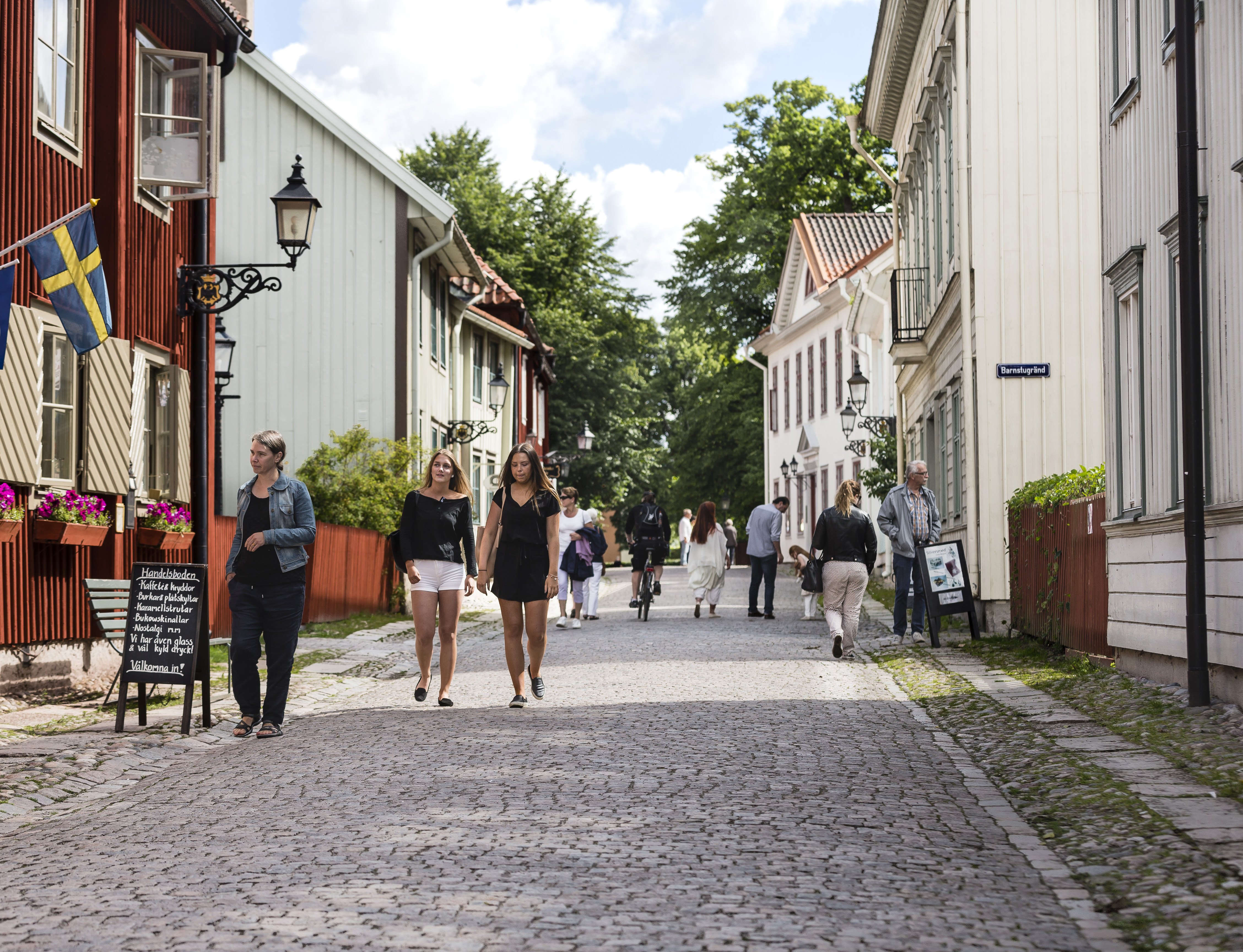 Wadköpigns huvudgata - Bertil Waldéns gata